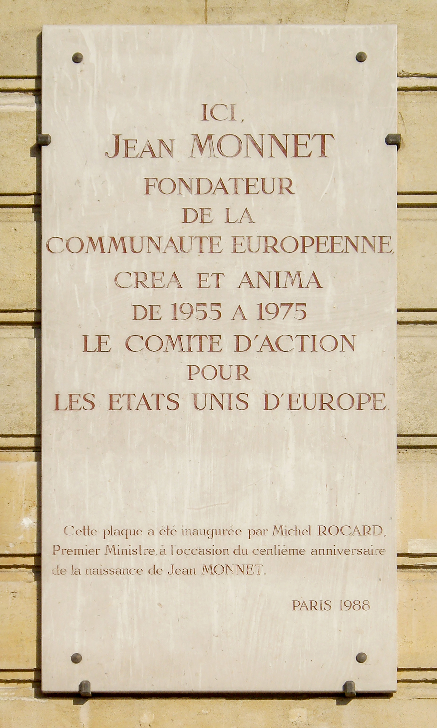 Plaque commémorative, 94 boulevard Flandrin, Paris 16e. « Ici Jean Monnet, fondateur de la Communauté européenne, créa et anima de 1955 à 1975 le comité d'action pour les États-Unis d'Europe. Cette plaque a été inaugurée par Michel Rocard, premier ministre, à l'occasion du centième anniversaire de la naissance de Jean Monnet. Paris 1988. »